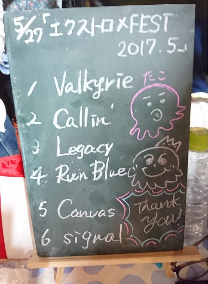 amiinAセトリボード(20170527(1))